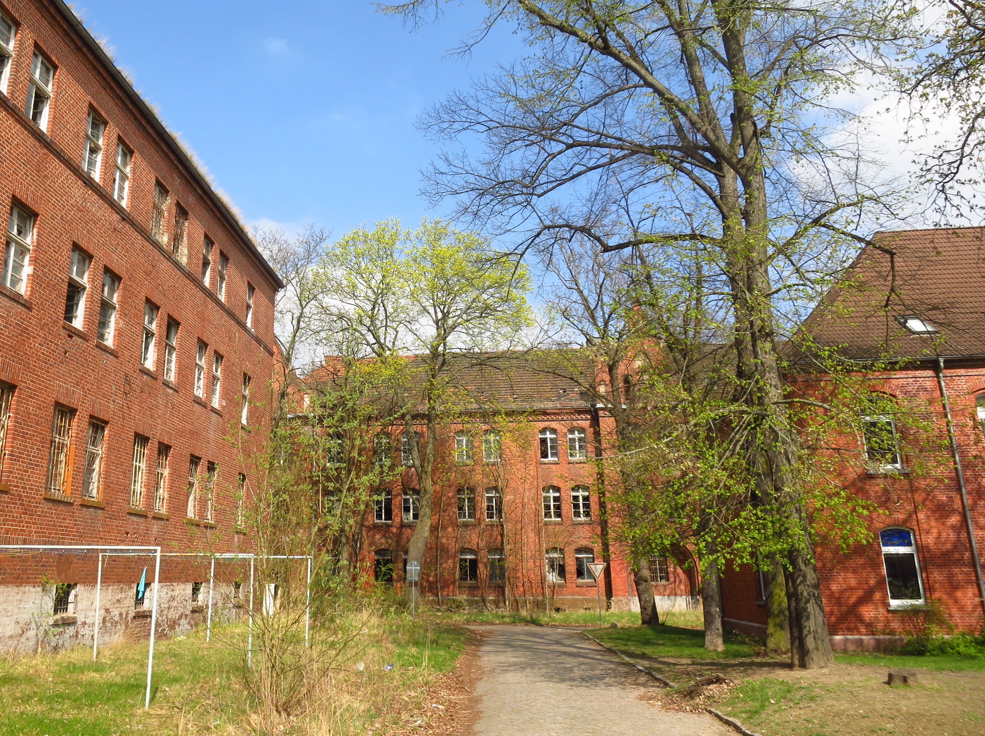 Jüterbog, Kasernengelände der Artellierie-Schießschule, Tauentzienstraße